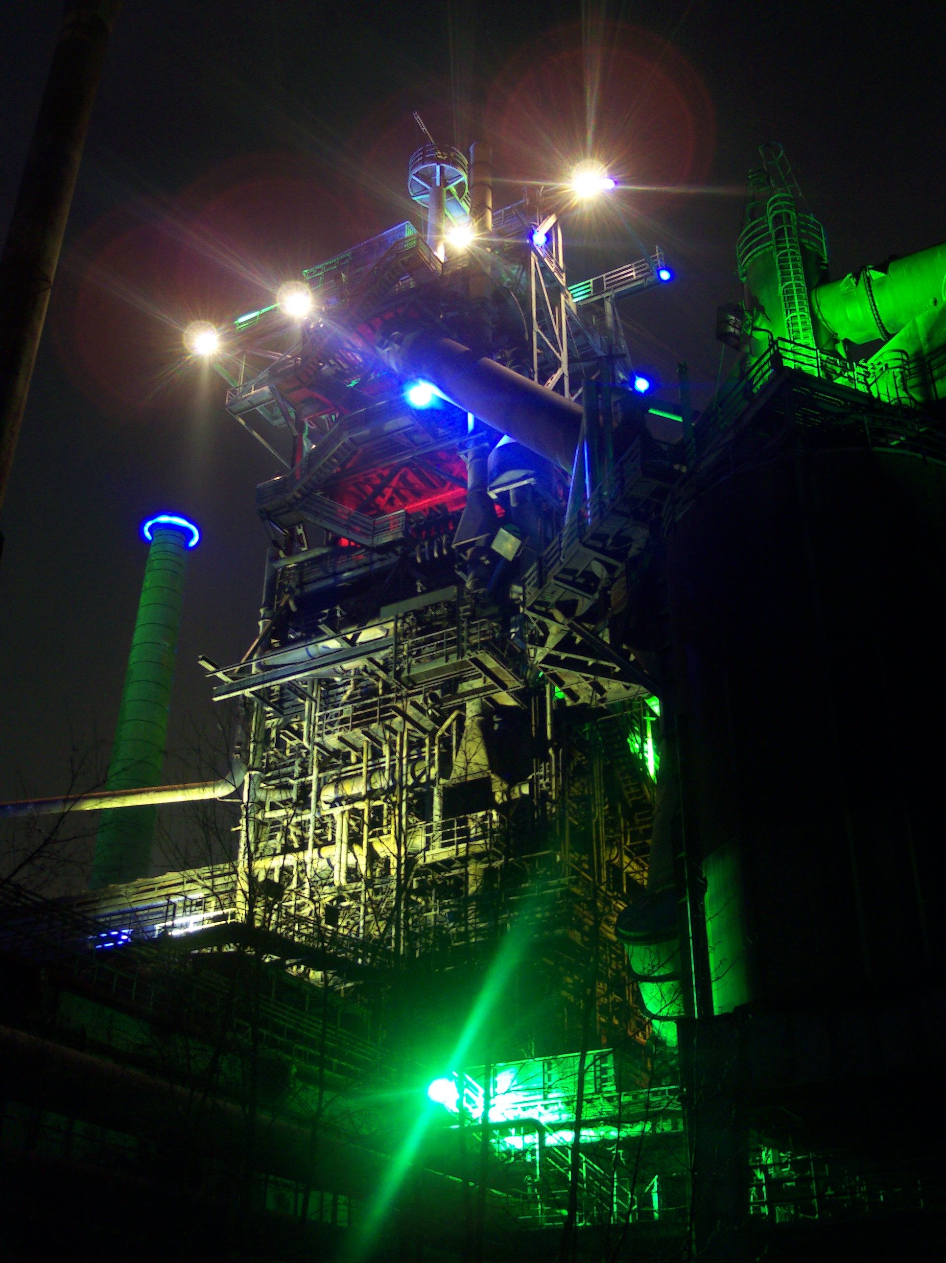 Landschaftspark Duisburg-Nord